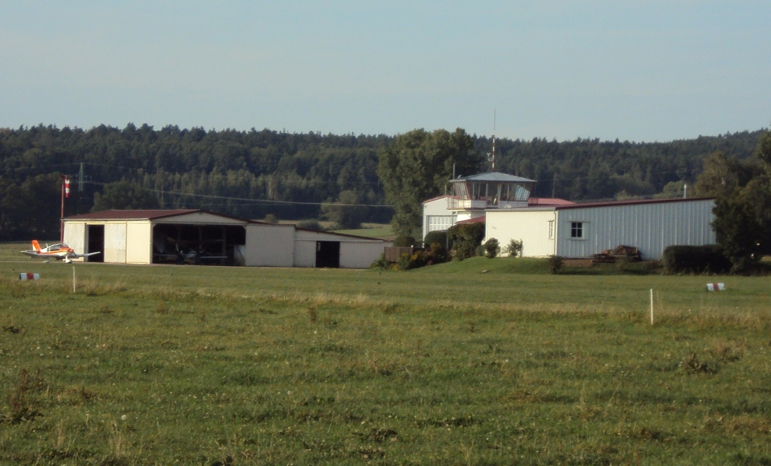 Der Flugplatz Treuchtlingen-Bubenheim im Altmühltal.